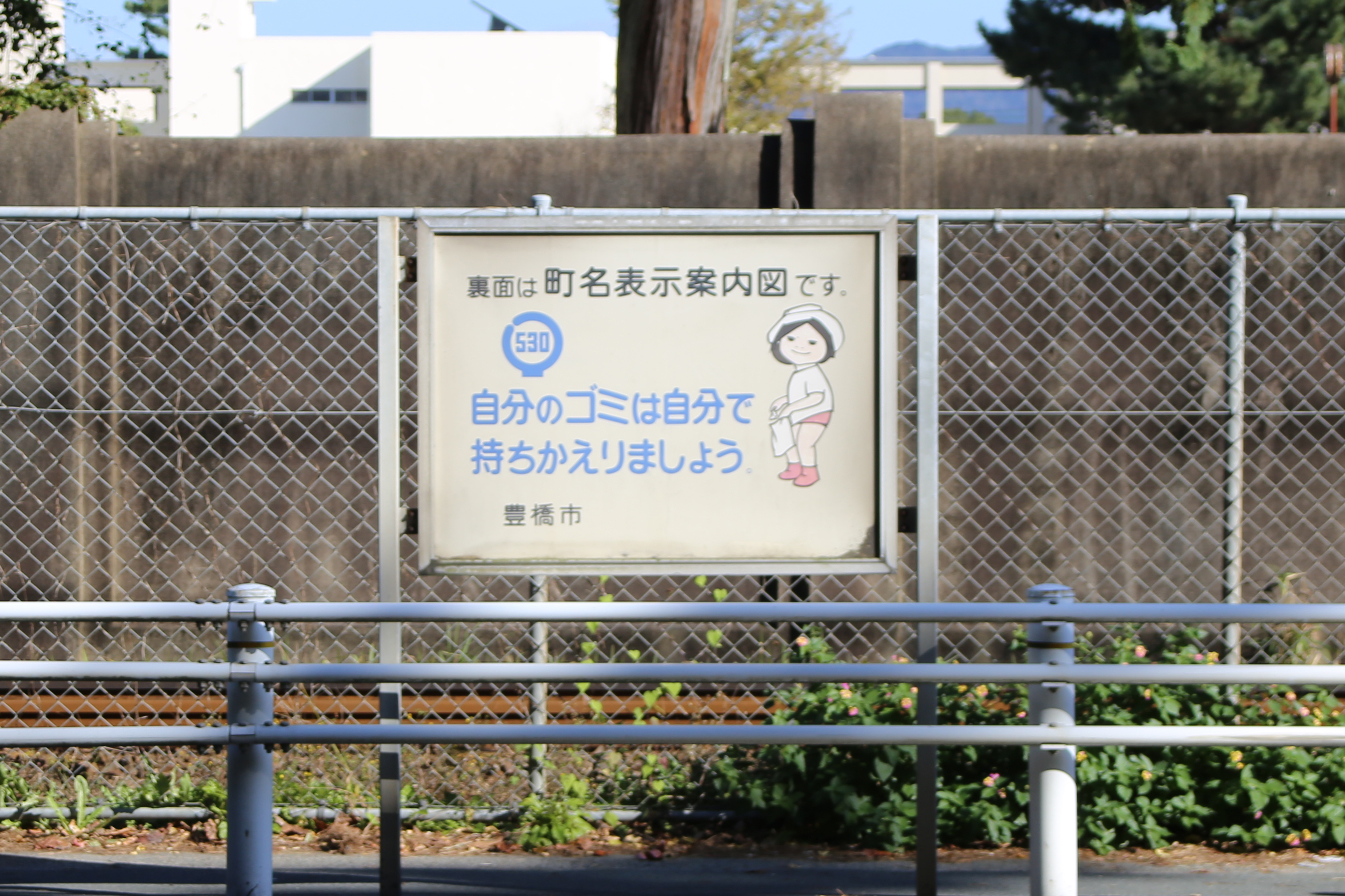 愛知県豊橋市の町名表示案内図裏の530運動看板